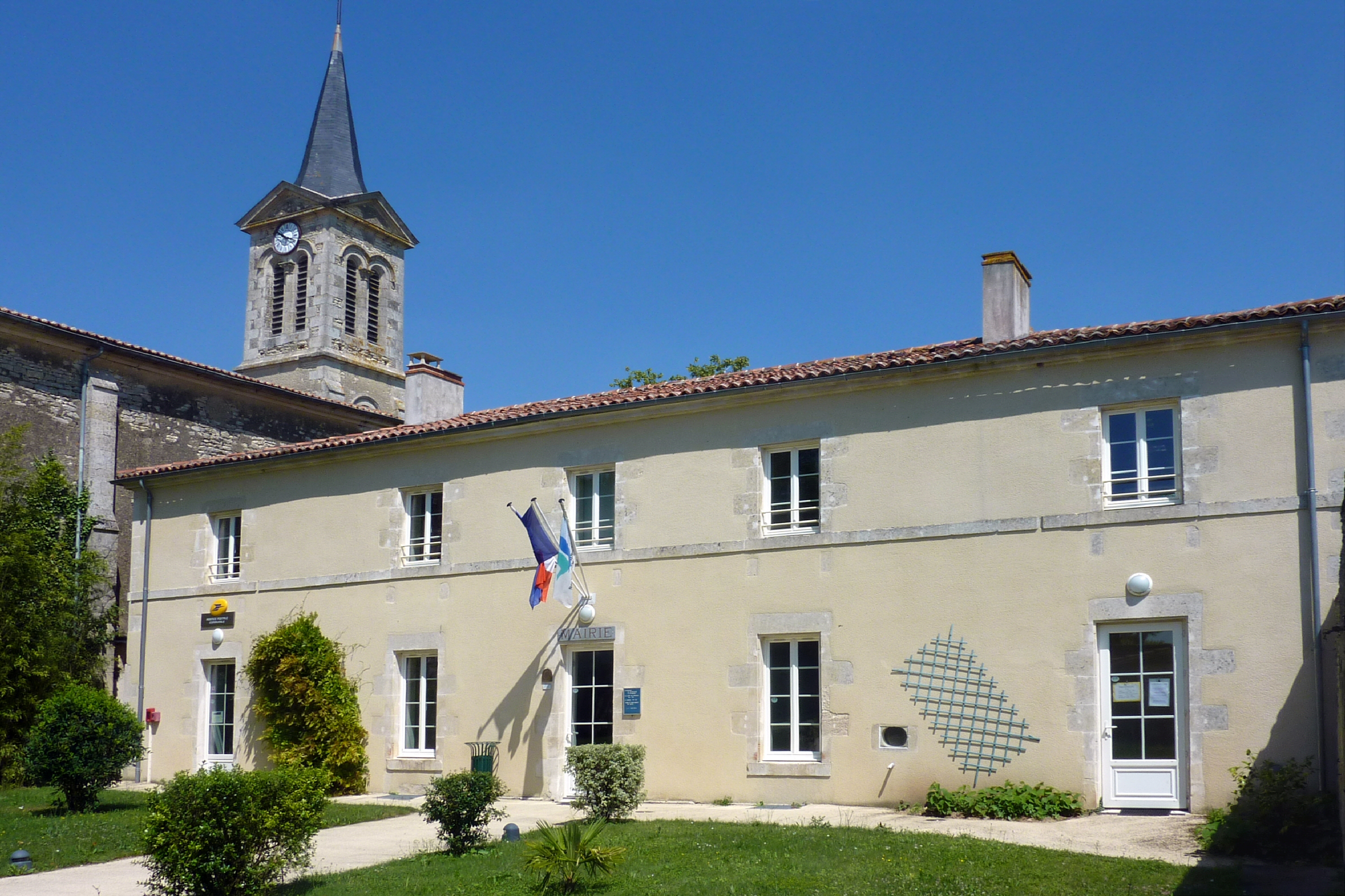 Mairie La Ronde Charente-Maritime France